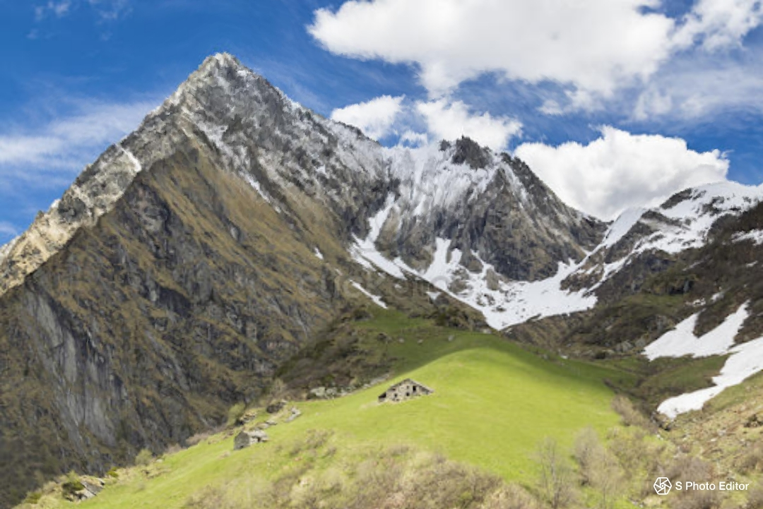 Alpeggio a 1900 m sotto il Monte Tagliaferro, nel Vallone di Mud